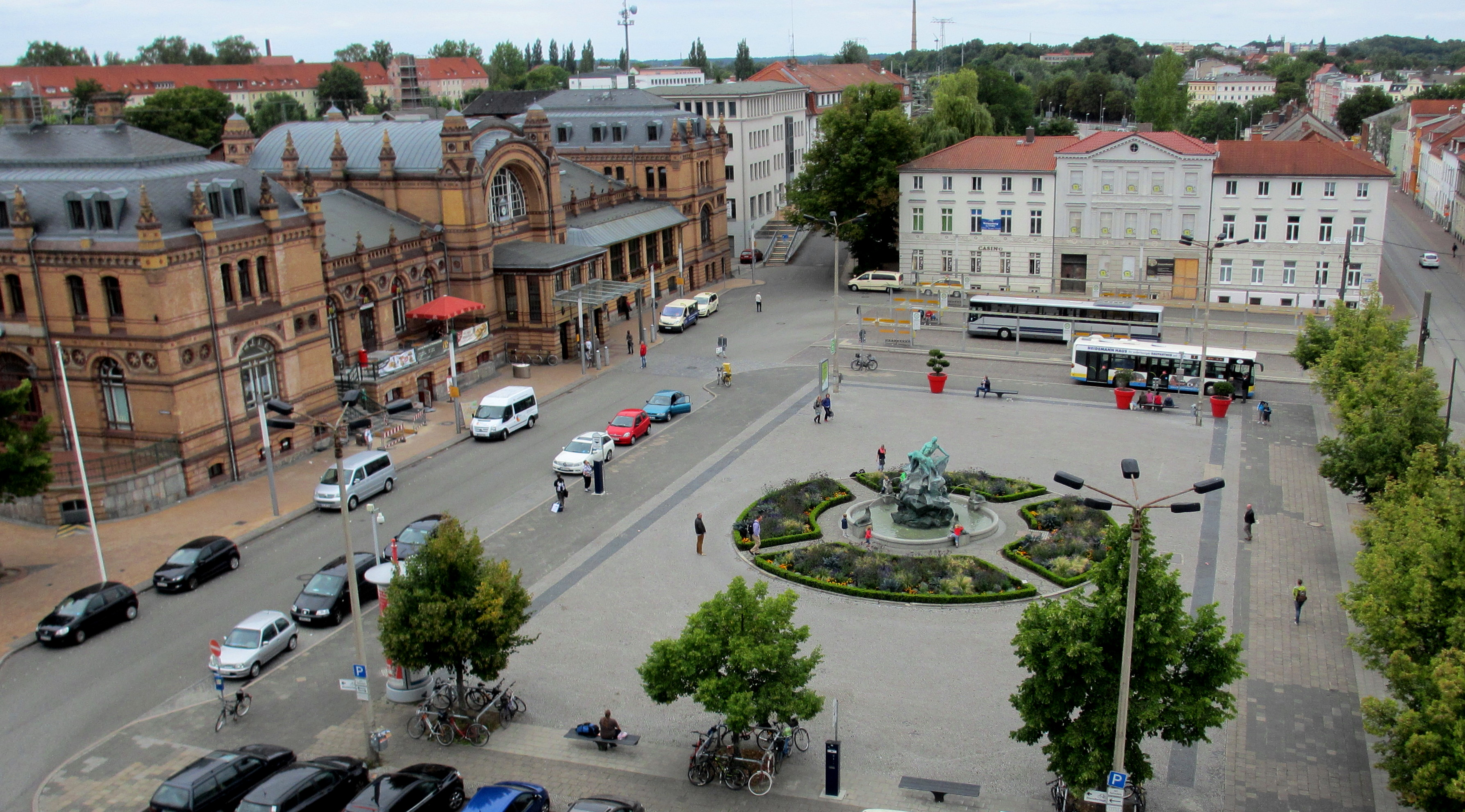 Schwerin Hauptbahnhof mit Blick auf den Bahnhofsvorplatz, den Grunthalplatz